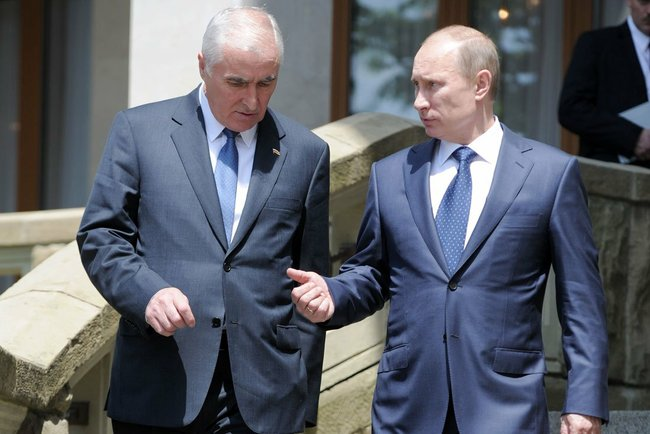 С Президентом Южной Осетии Леонидом Тибиловым.